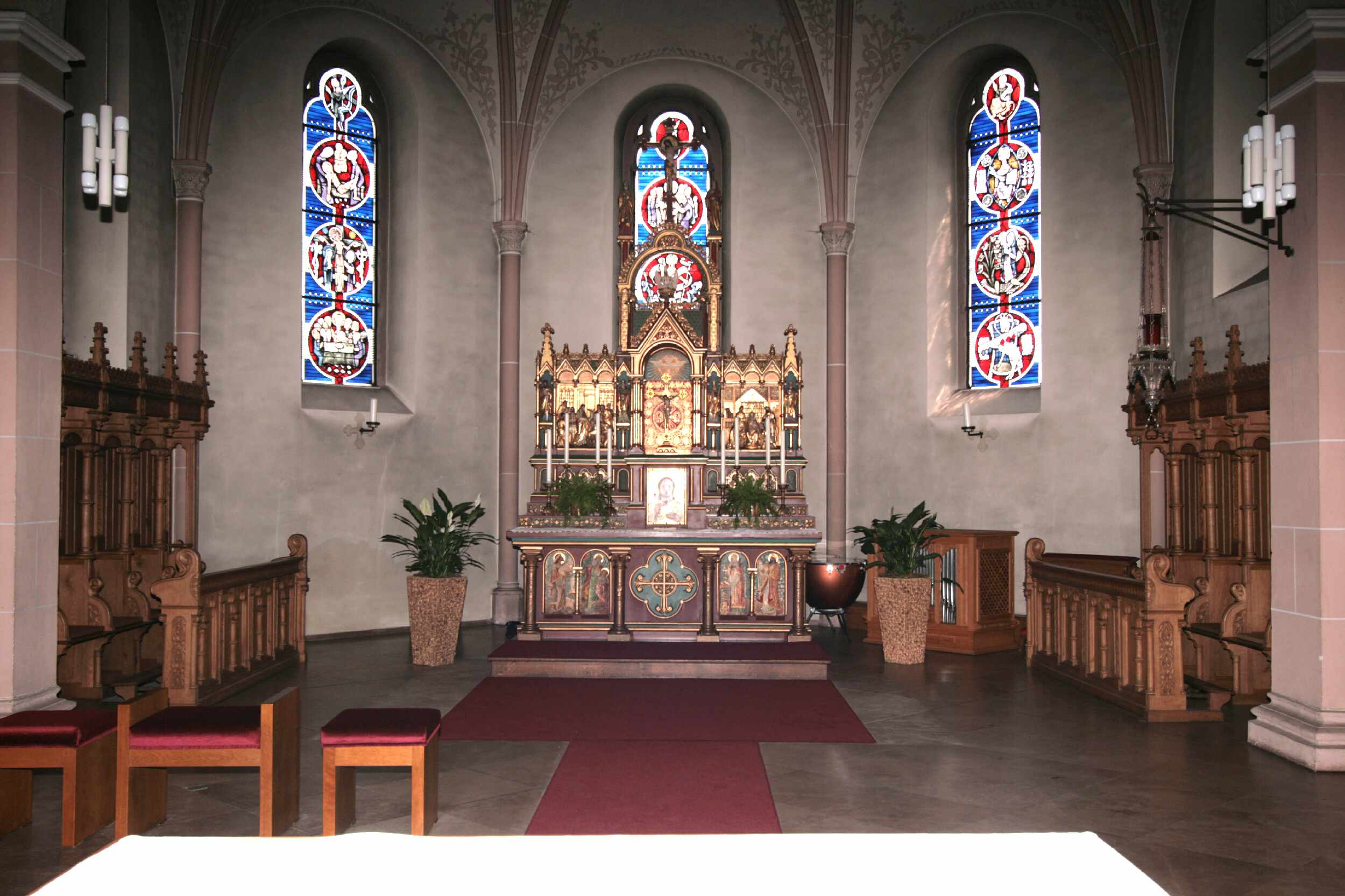 Beschreibung: Altar in der Kirche St. Martin in Bigge Quelle: Eigenes Foto Urheber: Wolfgang Poguntke Aufnahmedatum : 13.07.2008